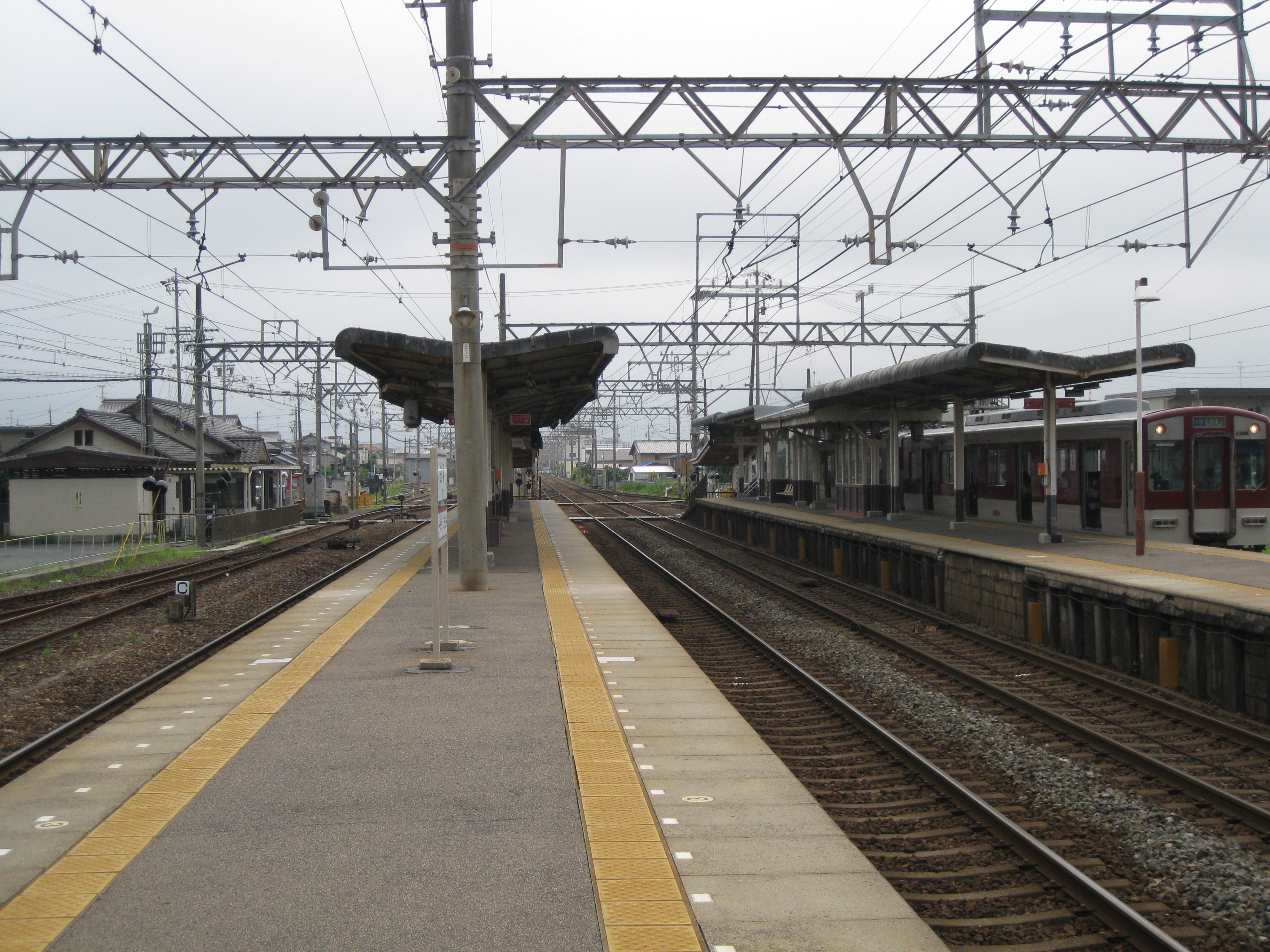 白塚駅プラットホーム